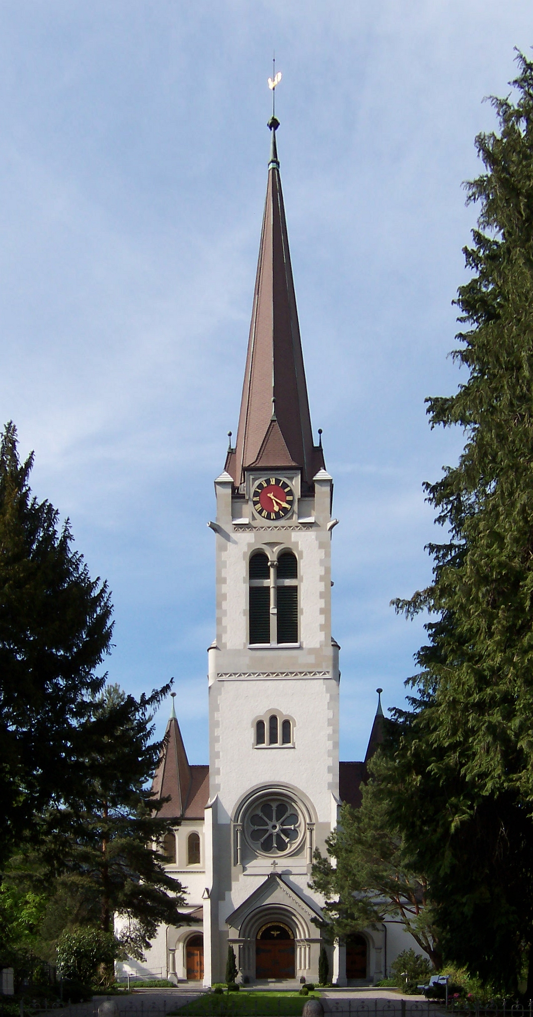 Die reformierte Evangelische Kirche in Altstätten, sie wurde 1904/06 vom Basler Architekten Paul Reber in neuromanischem Stil erbaut.